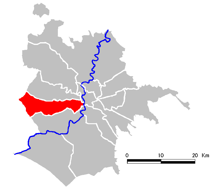 Municipio Roma XII